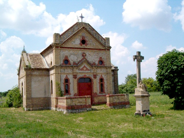 A baranyabáni római katolikus temető 1904-ben épült temetőkápolnája van a képen. Faragott bejárati ajtaja vaslemezekkel eltorlaszolva, tetejéről a fából ácsolt díszkupola hiányzik.